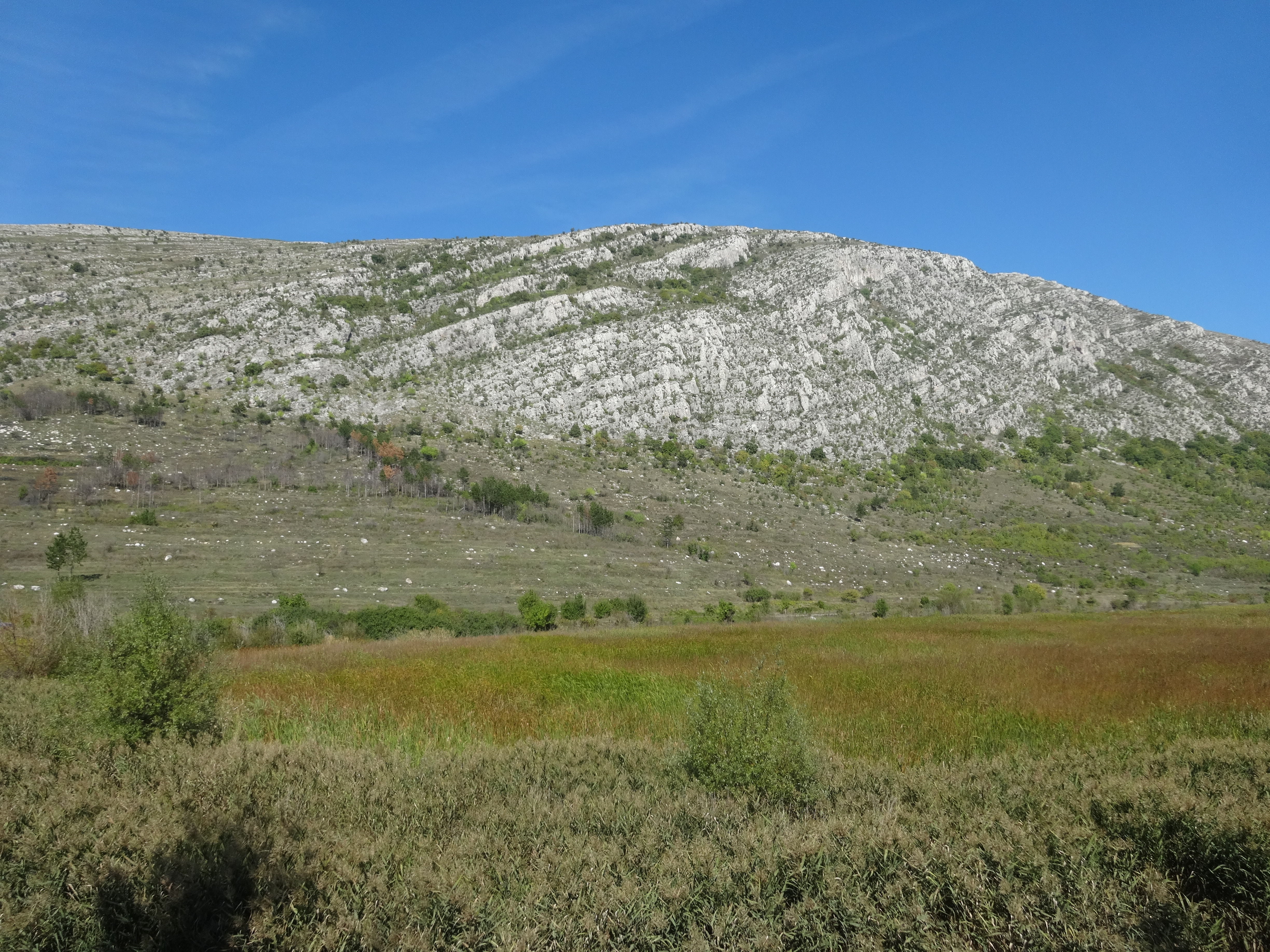 Dragomanska močvara u Bugarskoj, pogled na planinu Čepan